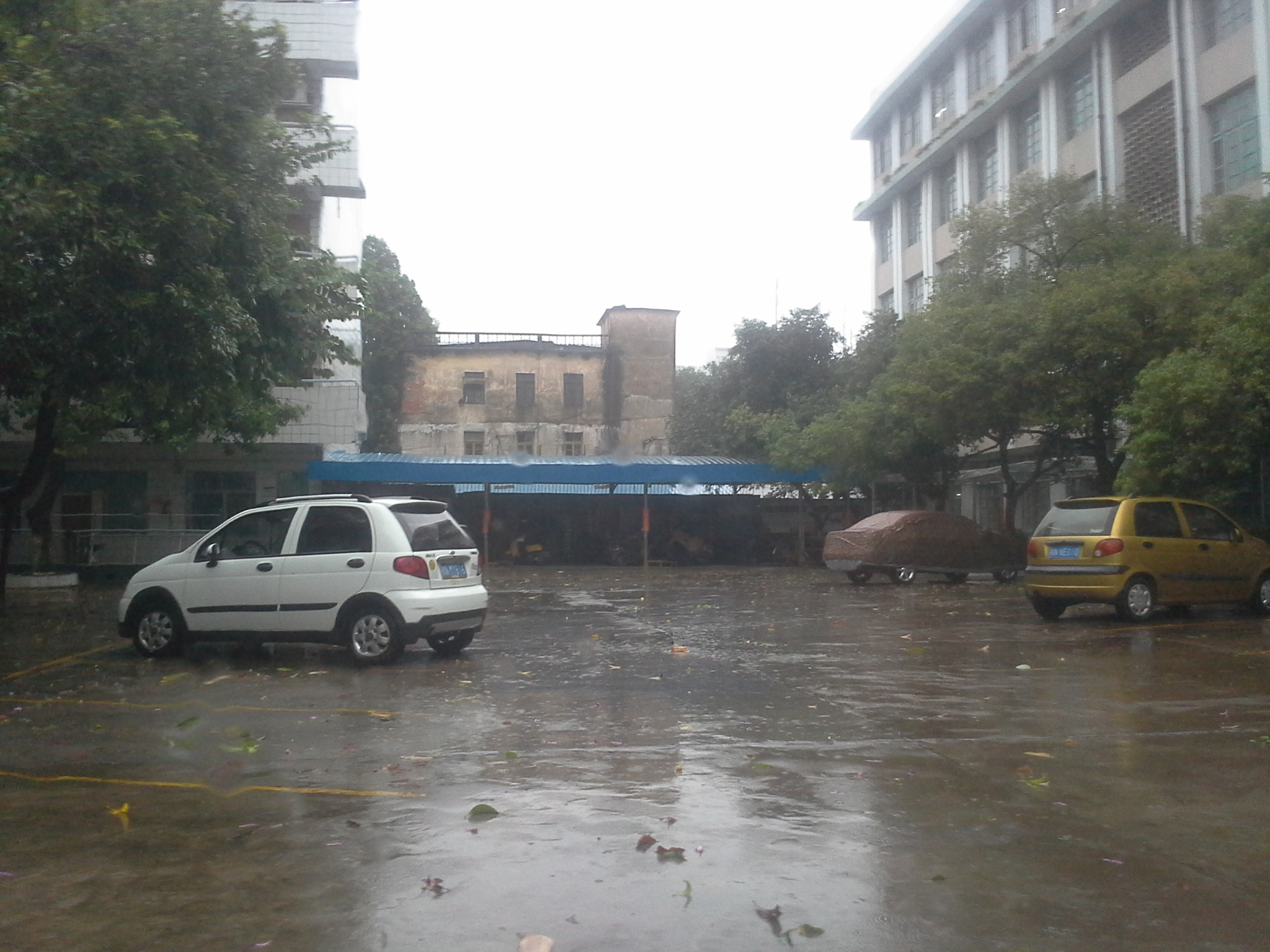 学校内部